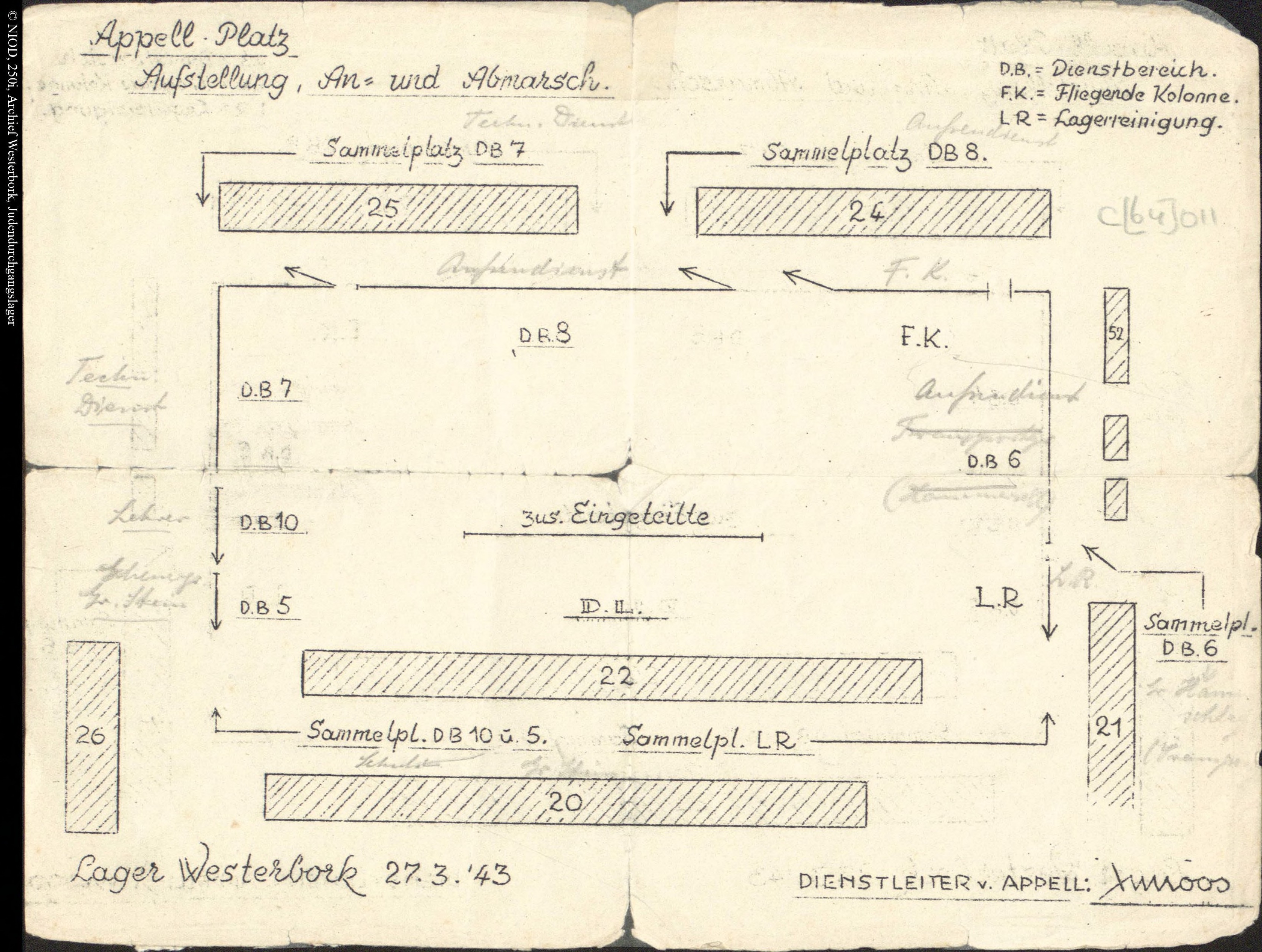 Appellplatz Abstellung An- und Abmarsch